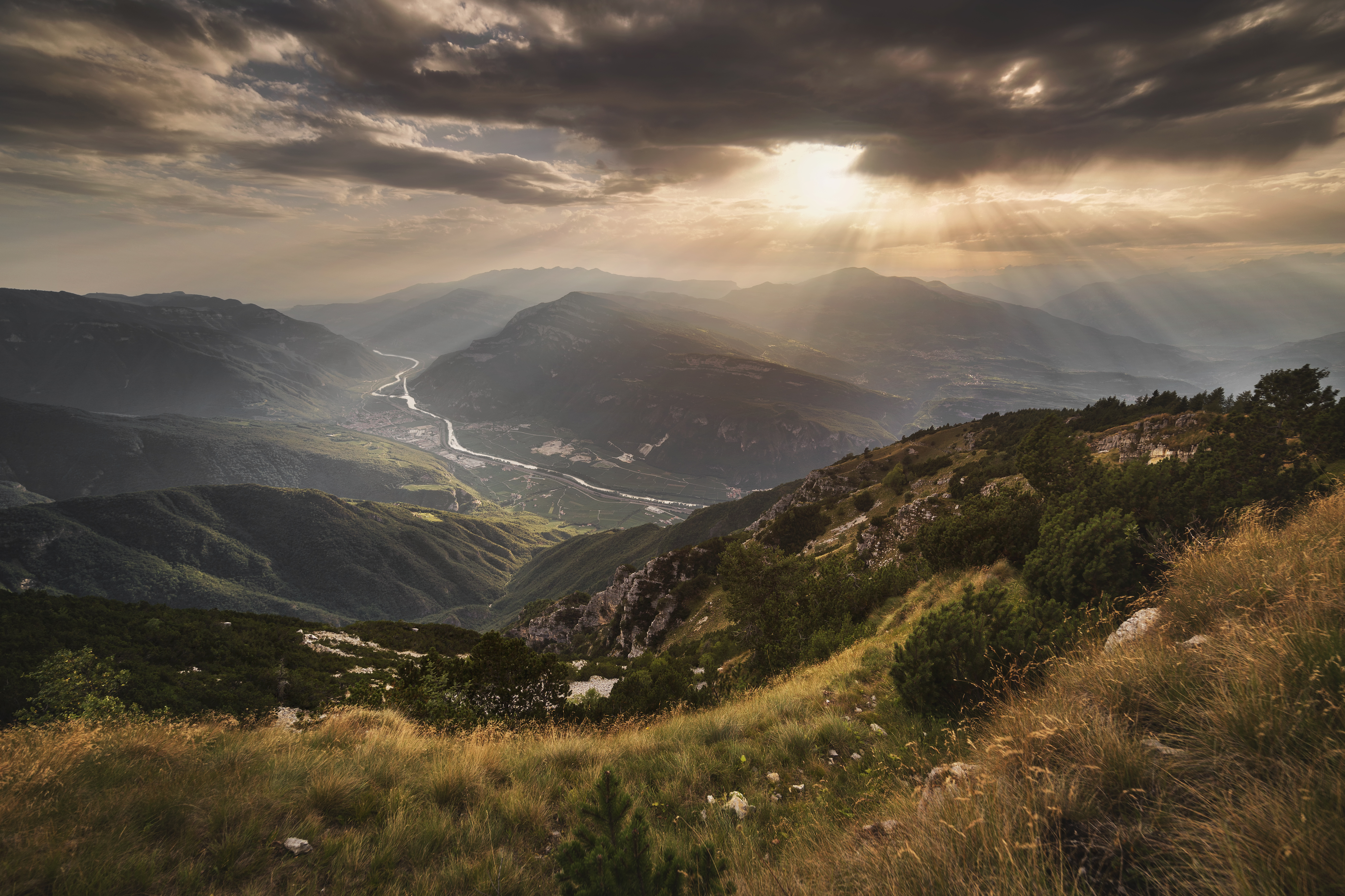 Monte Zugna (Q49967499)